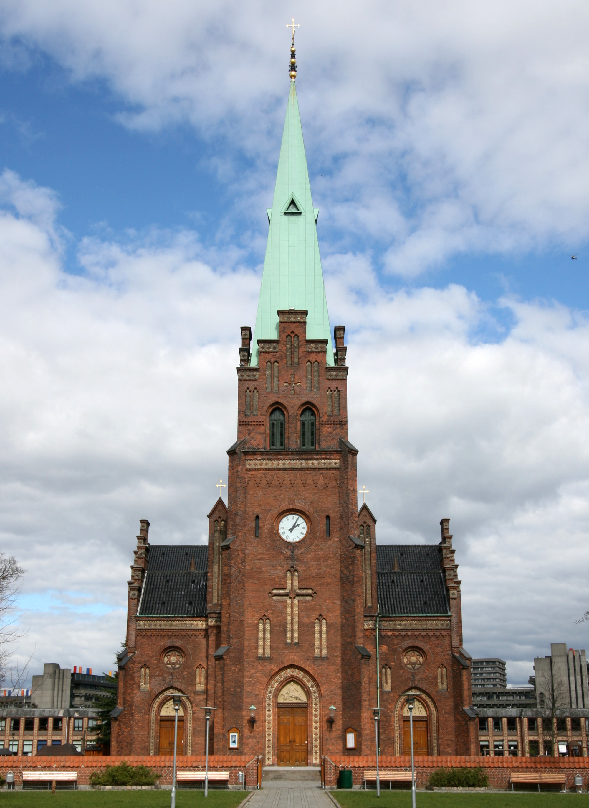 Sankt Johannes Kirke, Copenhagen, Denmark. west end, front